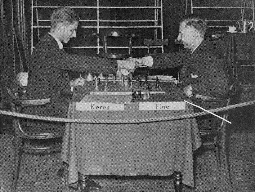 Keres-Fine remis. AVRO 1938